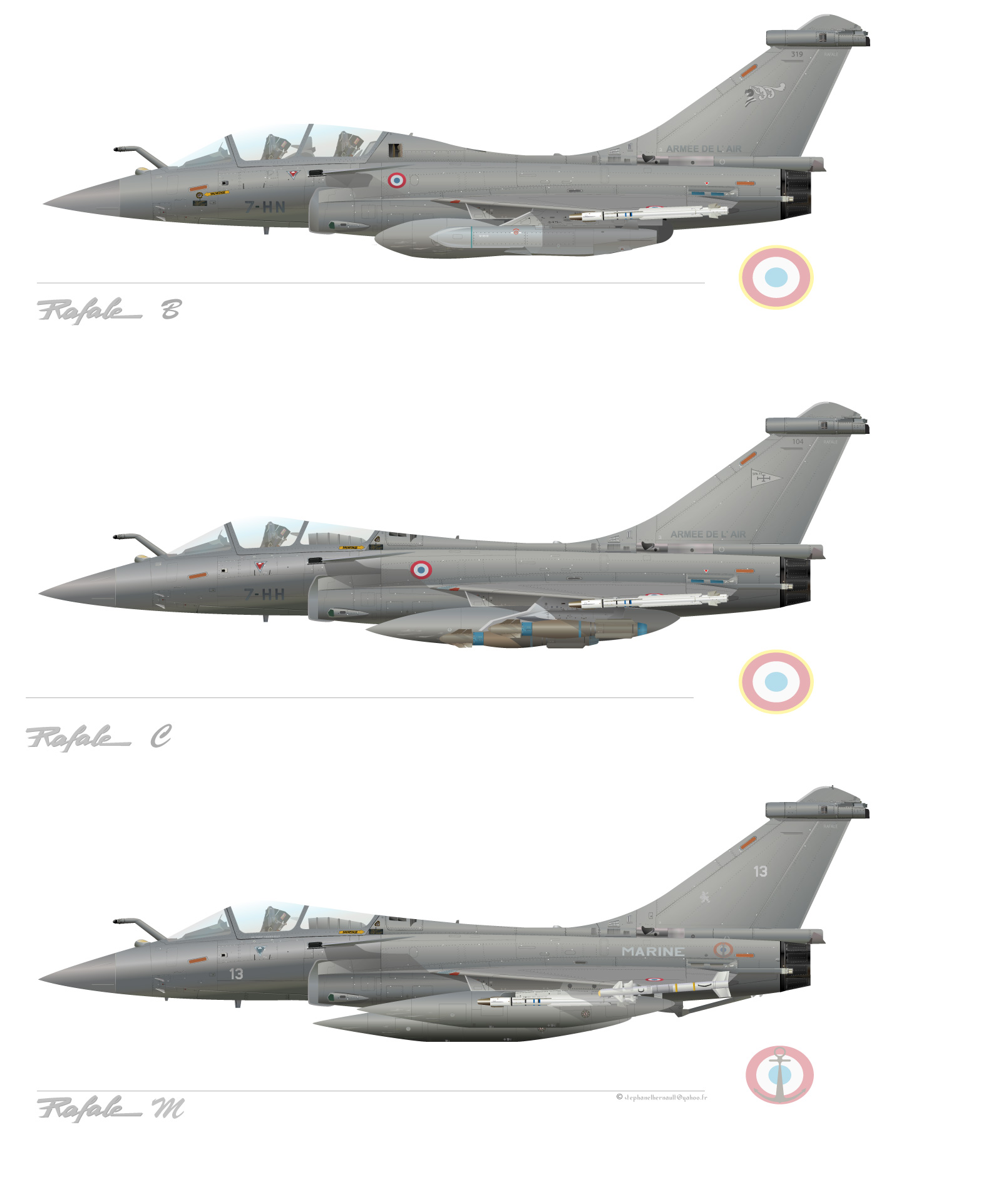 famille Rafale